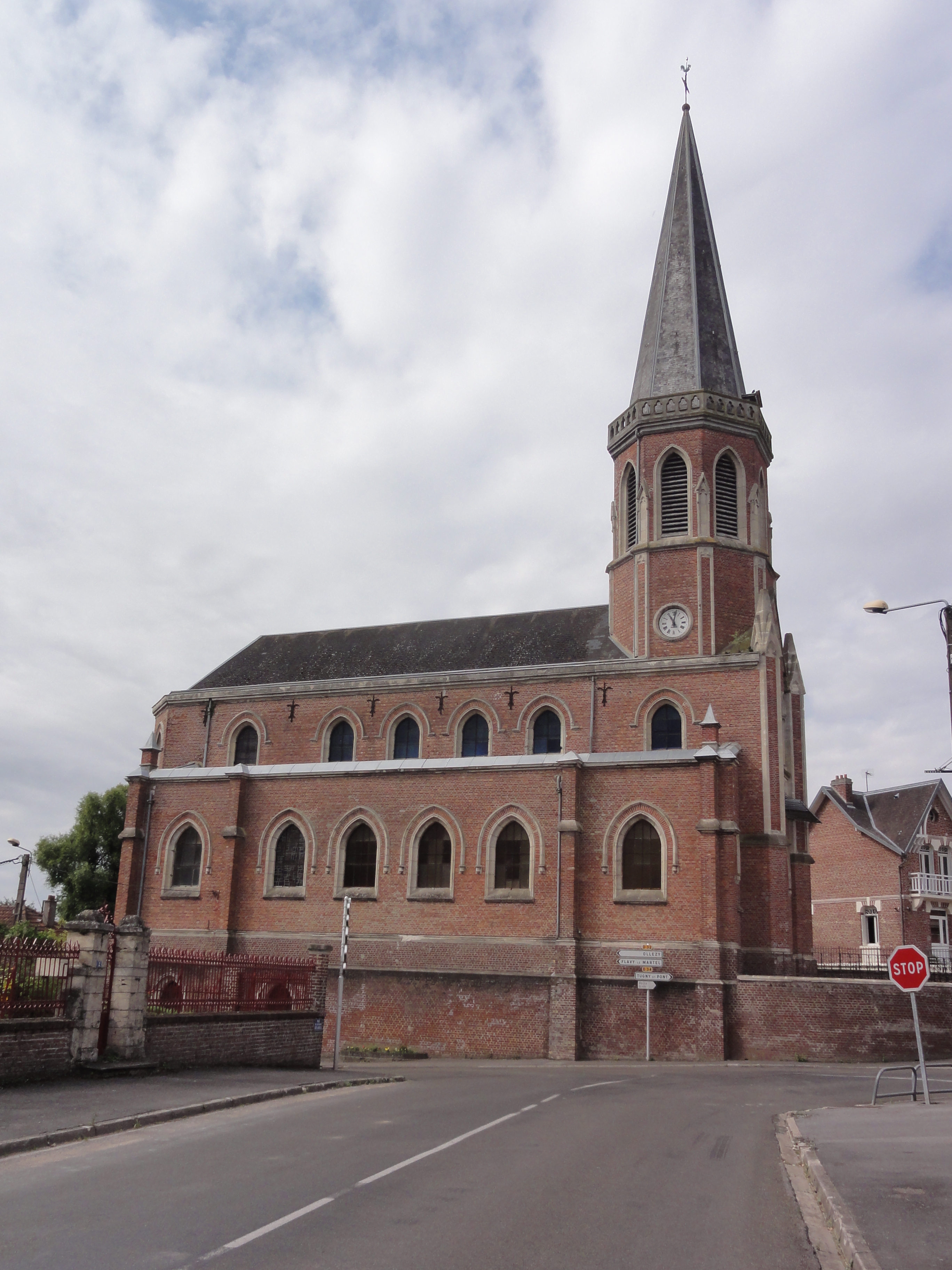 Saint-Simon (Aisne) Église de la Nativité-de-la-Sainte-Vierge